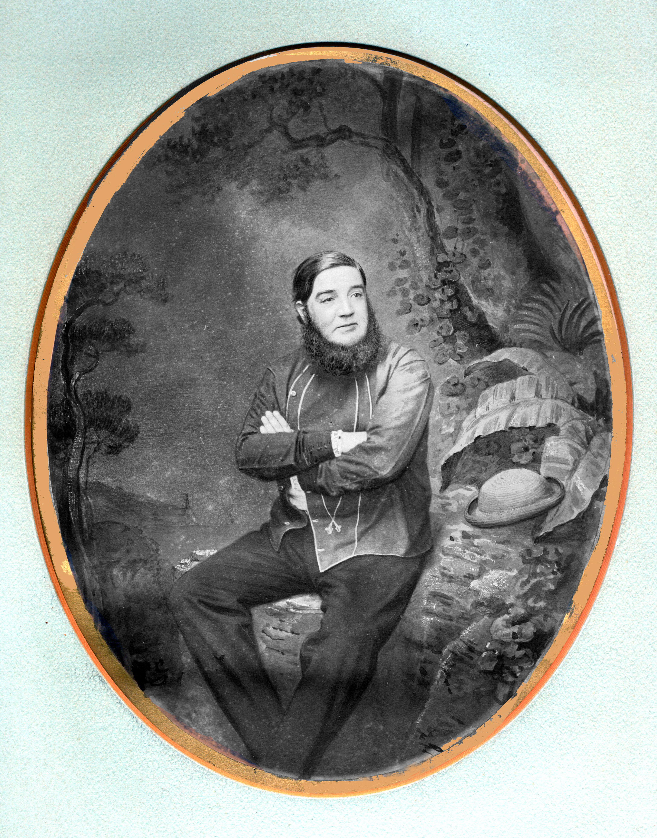 Акварельная копия дагерротипа 21х17мм, вторая половина 19-го века